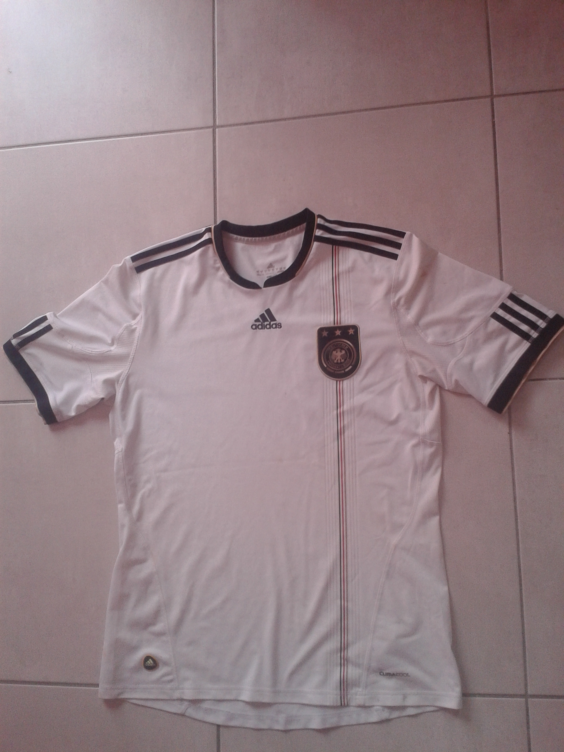 maillot de l'équipe d'Allemagne de football à la coupe du monde 2010